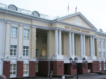 Дом дружбы народов.